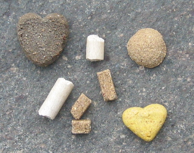 Sortiment verschiedener Leckerlies